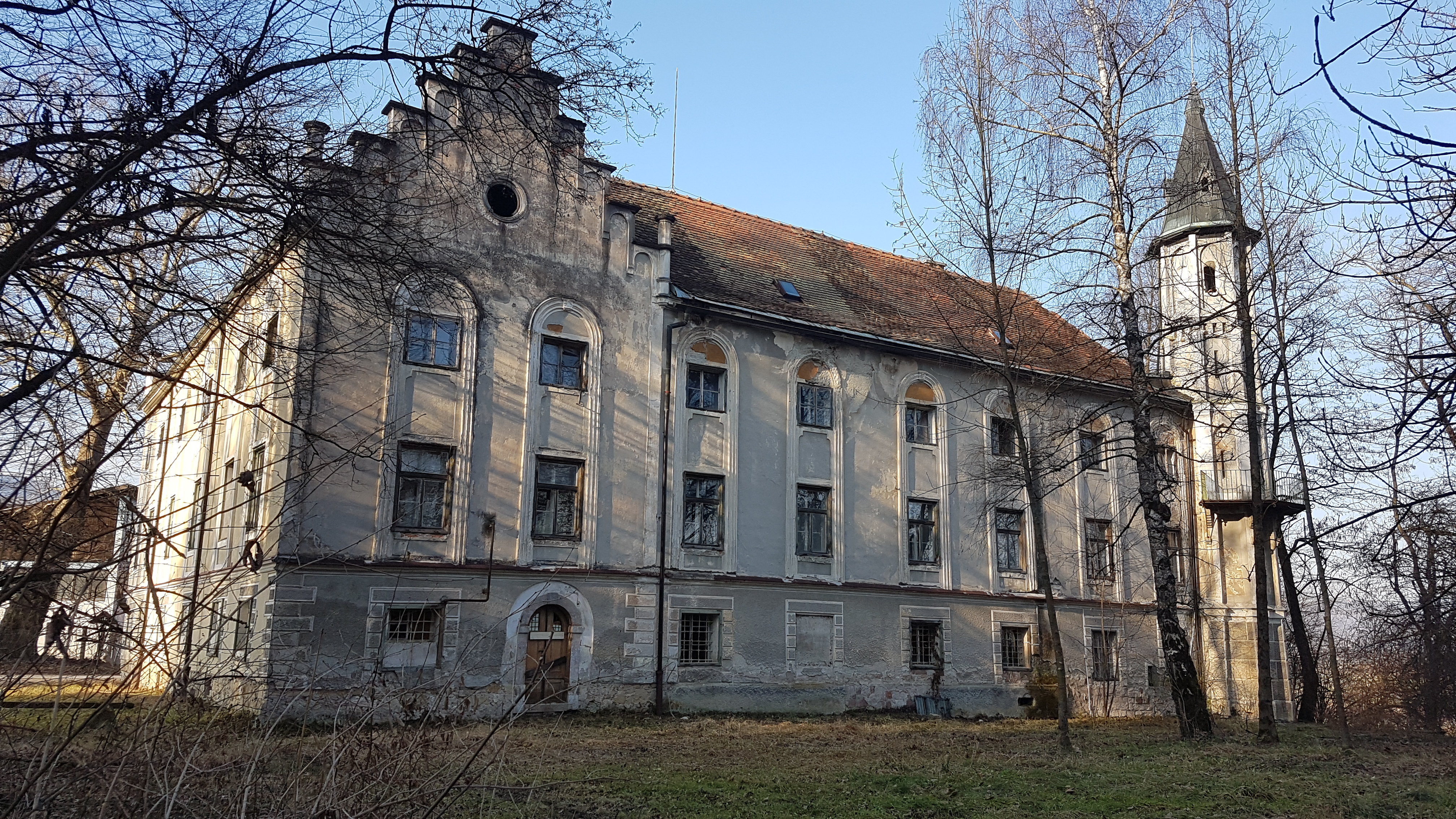 Dvorec Štrovsenek v Šmatevžu, občina Braslovče